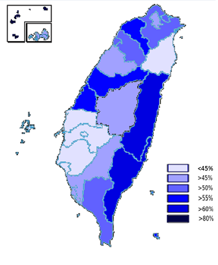 2016年平地原住民各縣市得票率最高政黨得票率